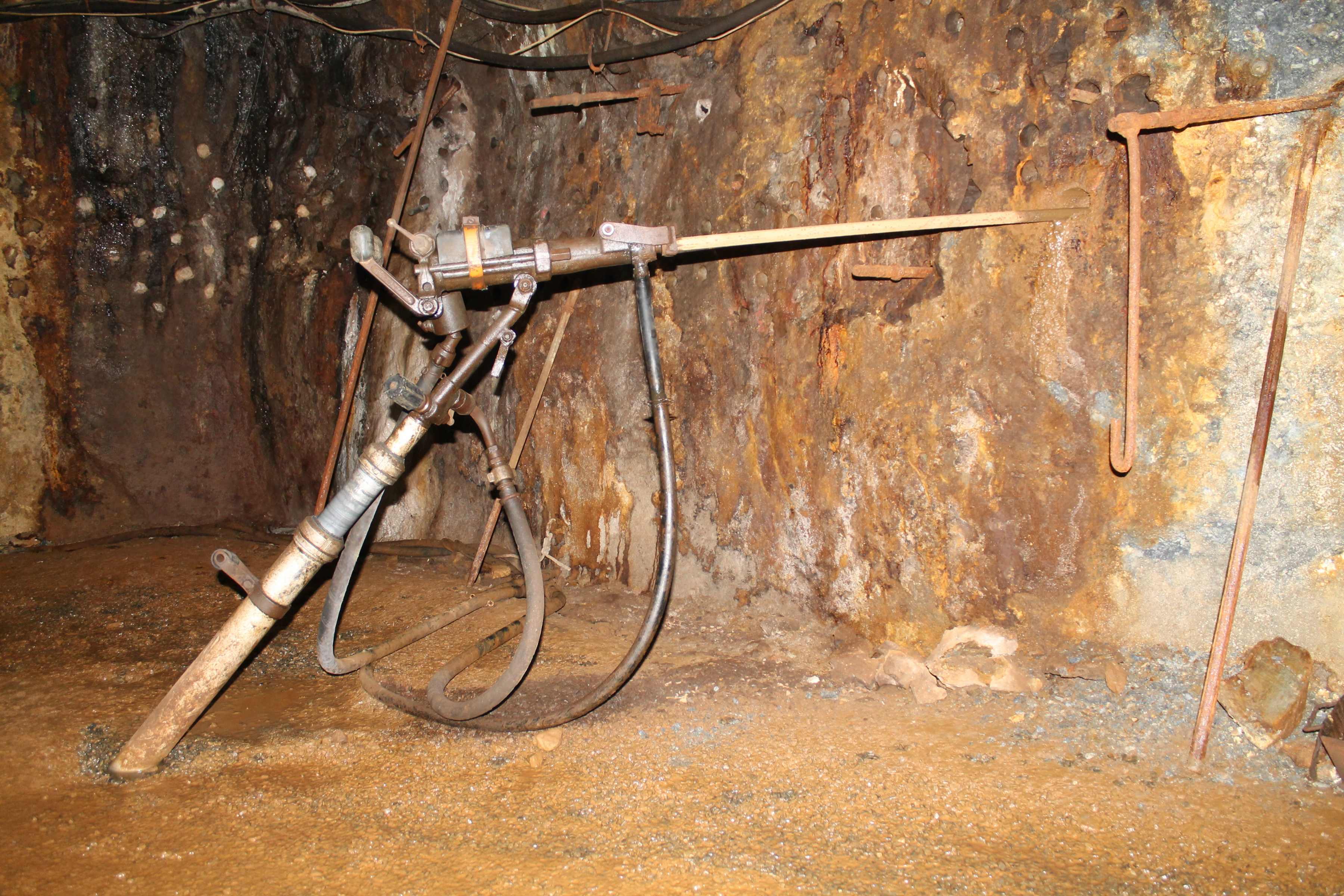 Bohrhammer 1